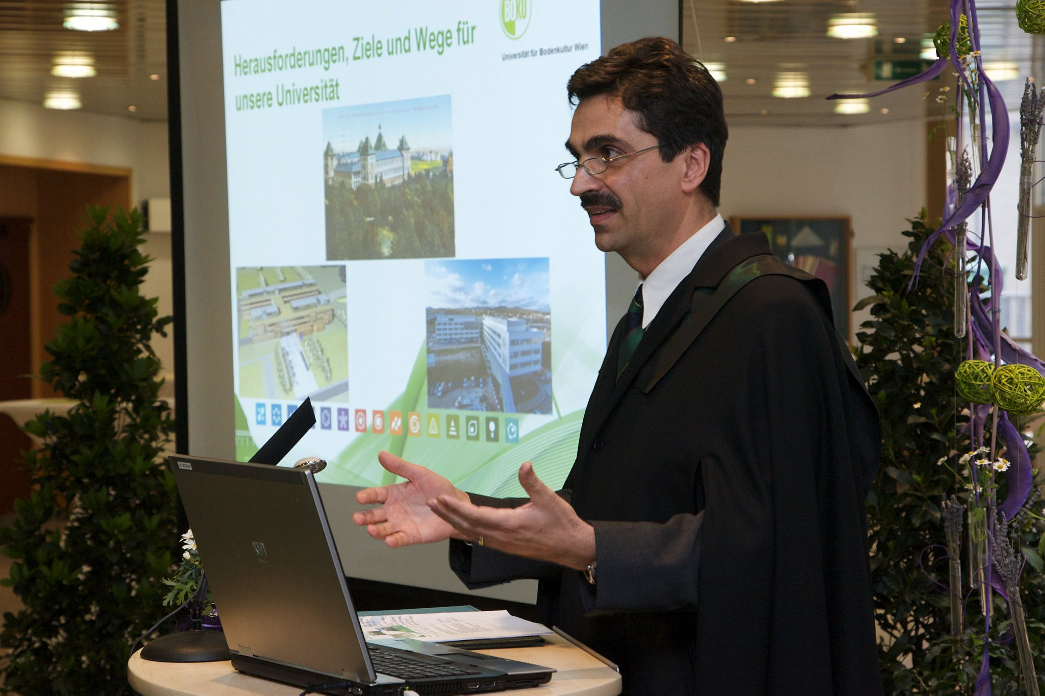 BOKU-Rektor Martin Gaerzabek bei der Inauguration am 23. April 2010